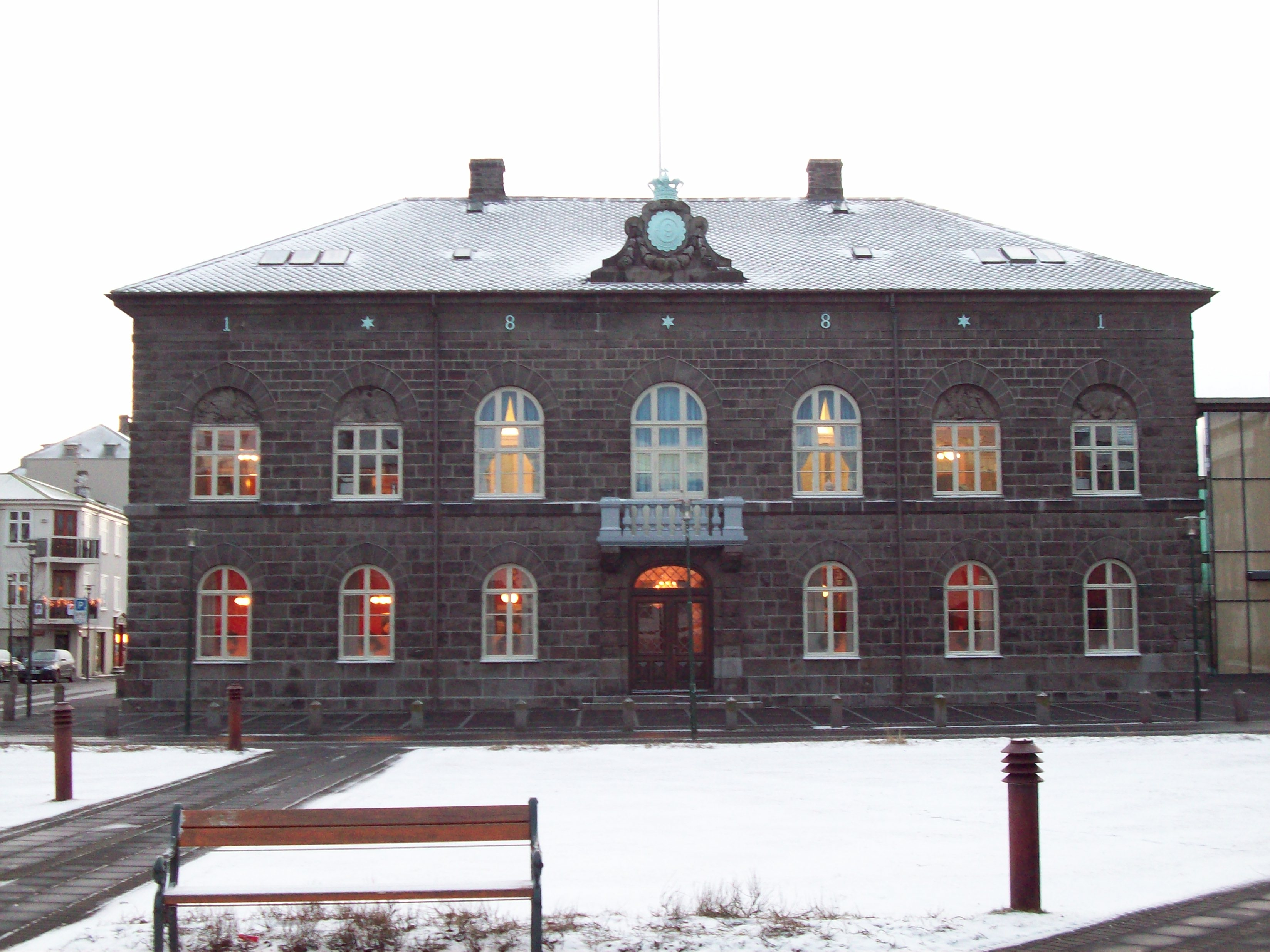 Alþingi